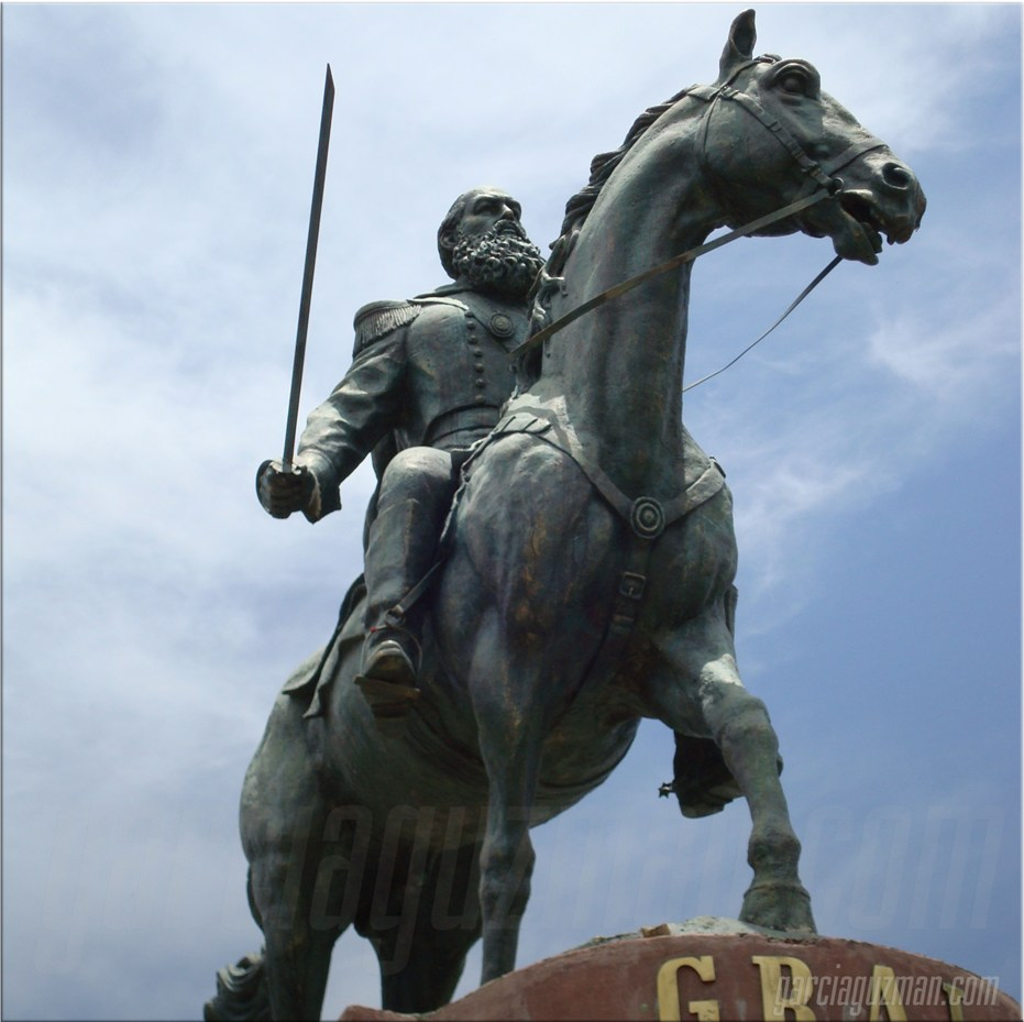 Ex presidente de Bolivia